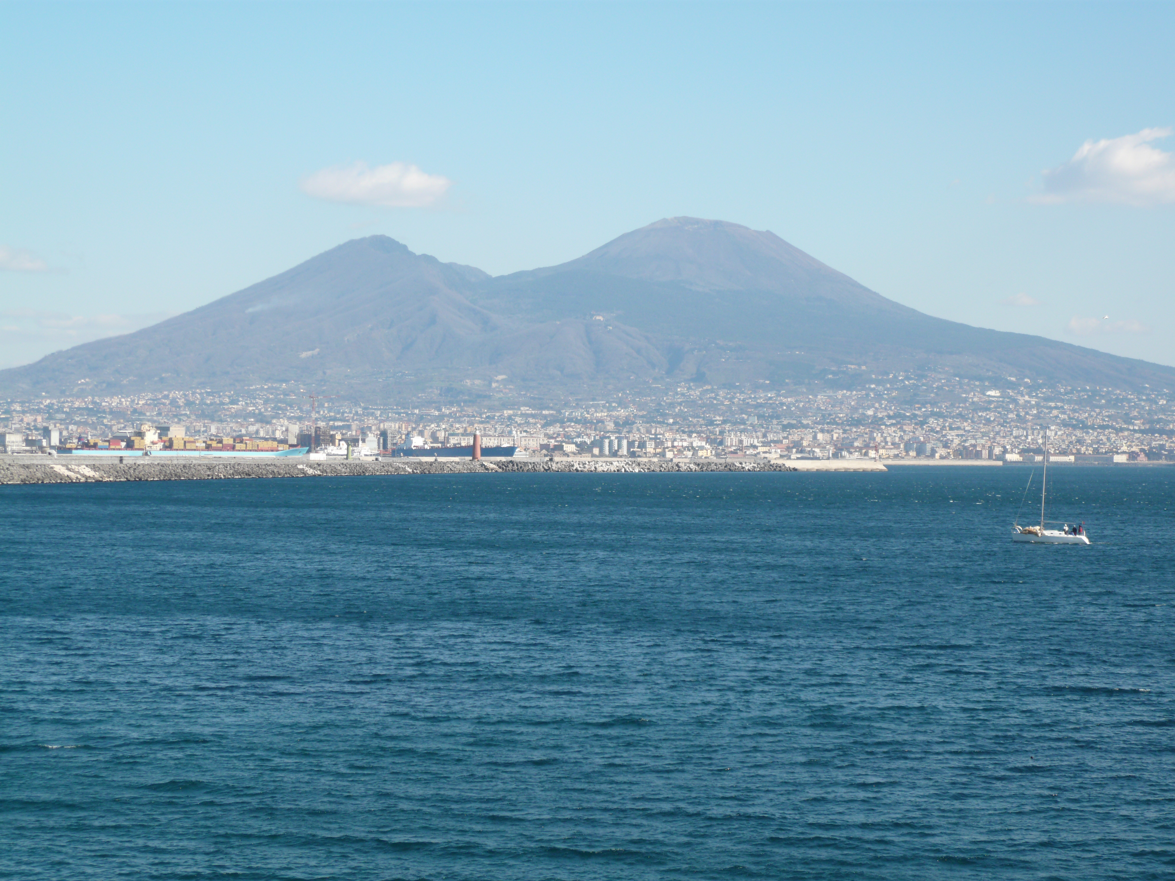 Vesuvio visto da via Nazario Sauro (Napoli). A sinistra del vulcano il Monte Somma che Ã¨ quanto resta dell' antico cratere. Autore foto: Roberto De Martino